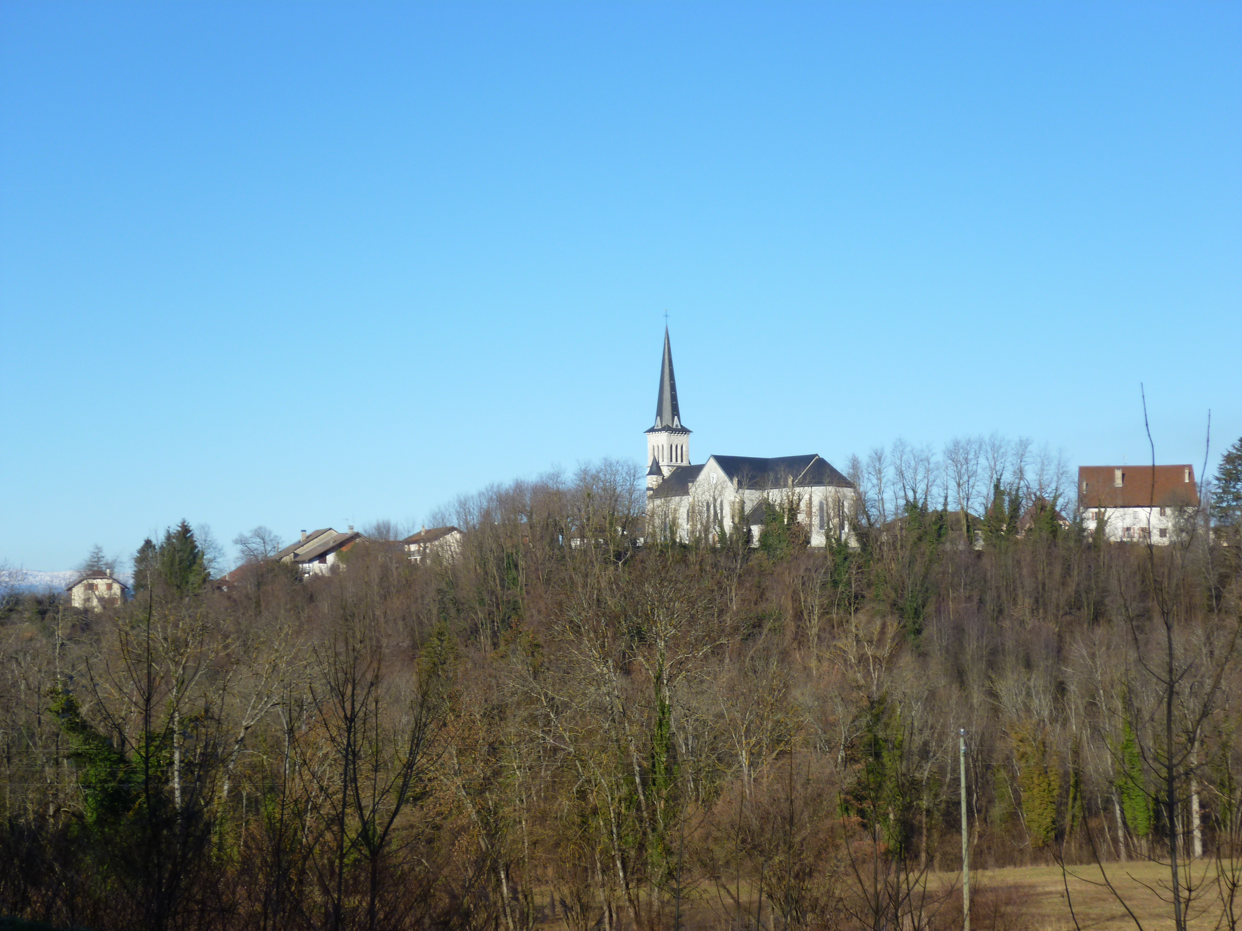 Fillinges in Haute-Savoie, France